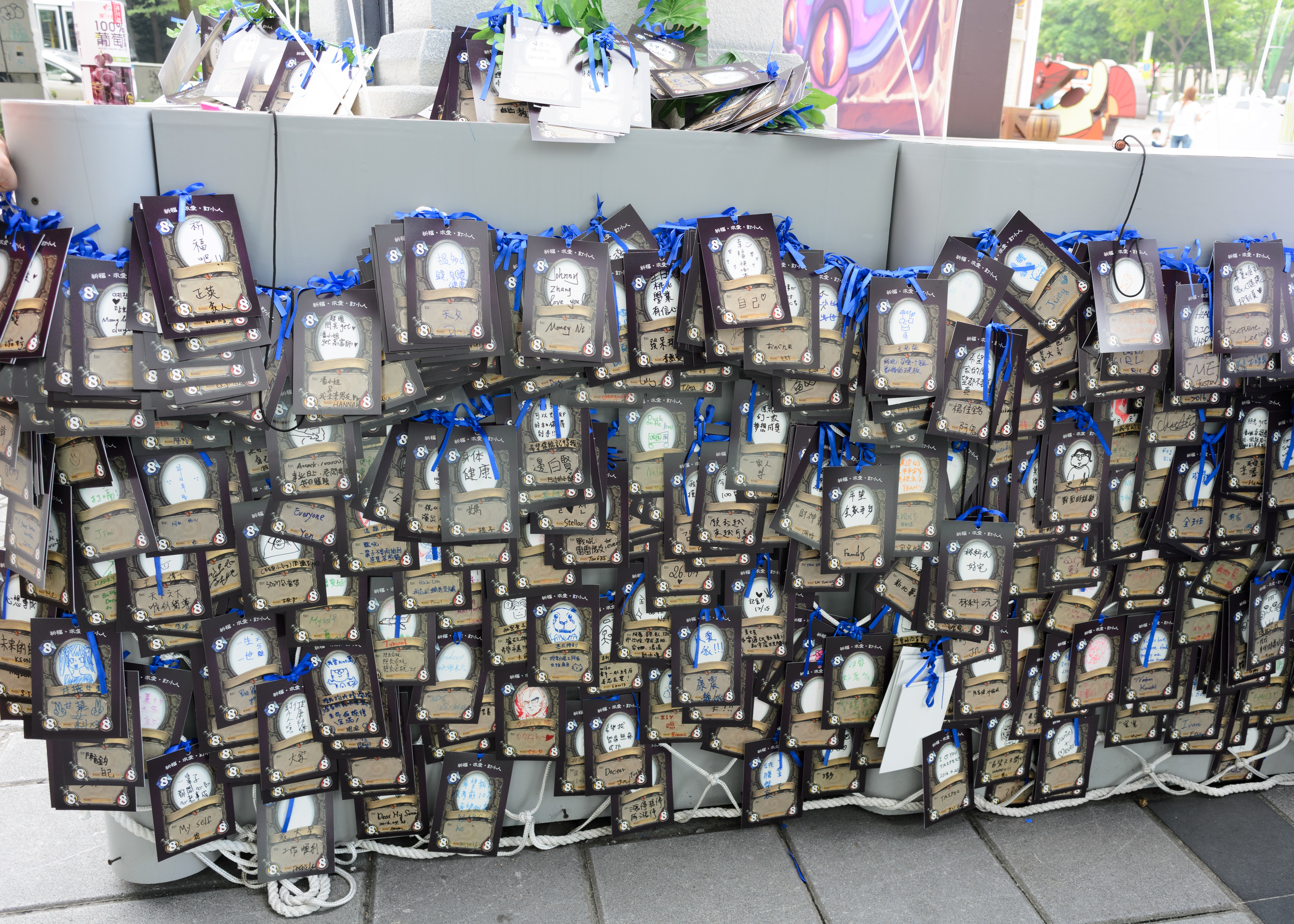 街頭競技場活動地標基礎旁懸掛歷次活動玩家、遊客留下的祈願卡。